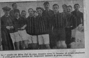 Milan 1910-11